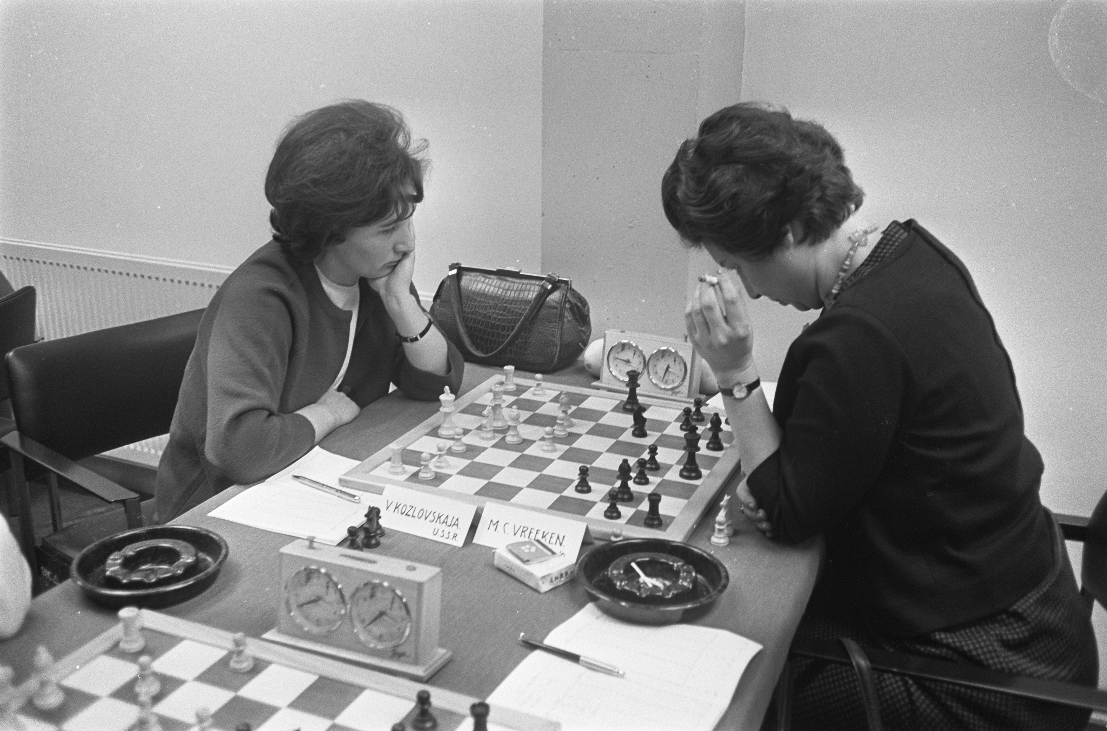 Hoogovenschaaktoernooi, de dames, leidster Kozlovskaja met wit tegen mevrouw Vreeken